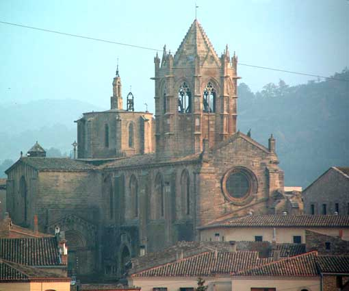 Vallbona de les Monges conjunto. La foto está realizada por AnTeMi y la cede a Wikipedia.